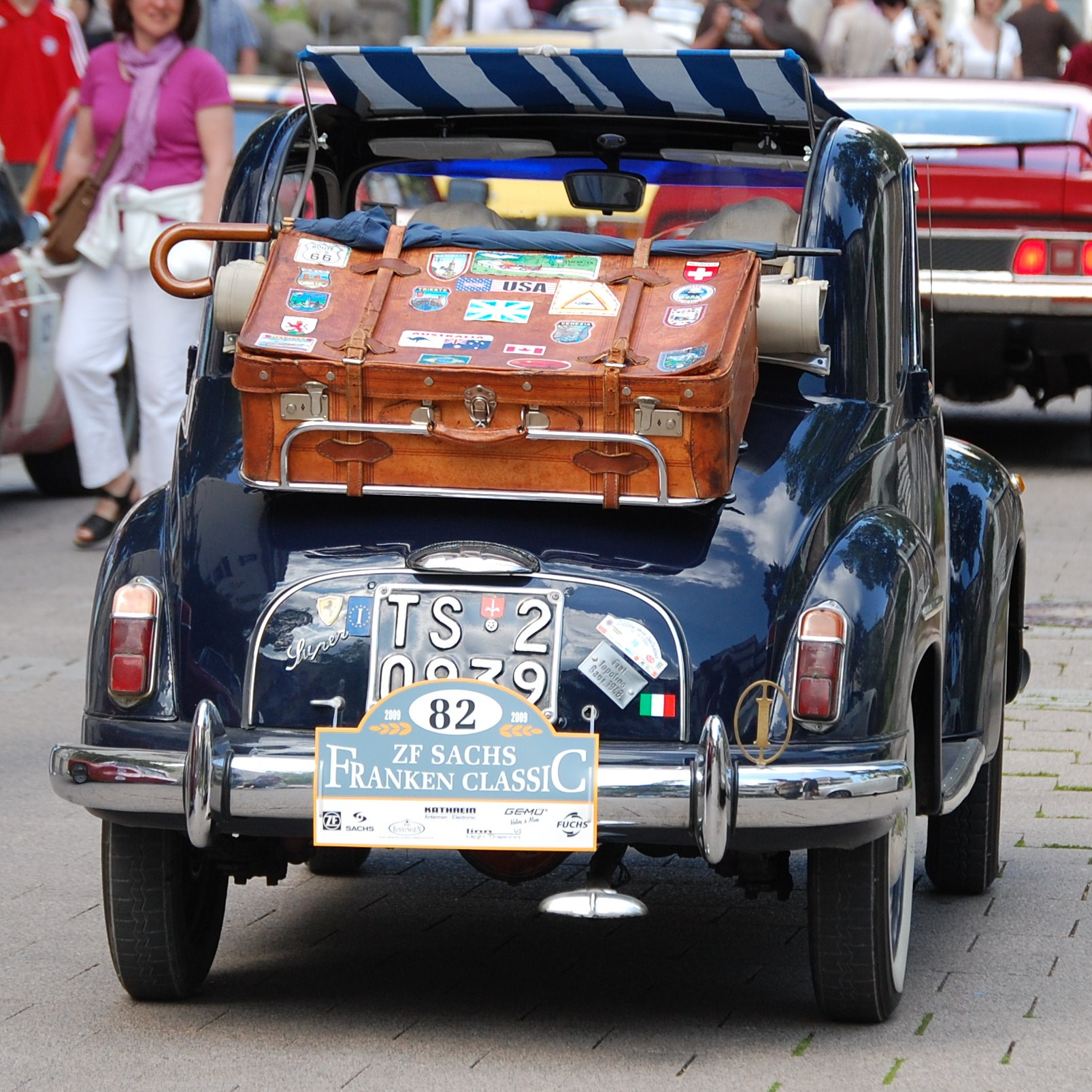 FIAT Topolino Super (1948) mit Sonnenmarkise und Gepäckablage